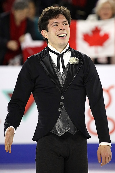 2018 Skate Canada International